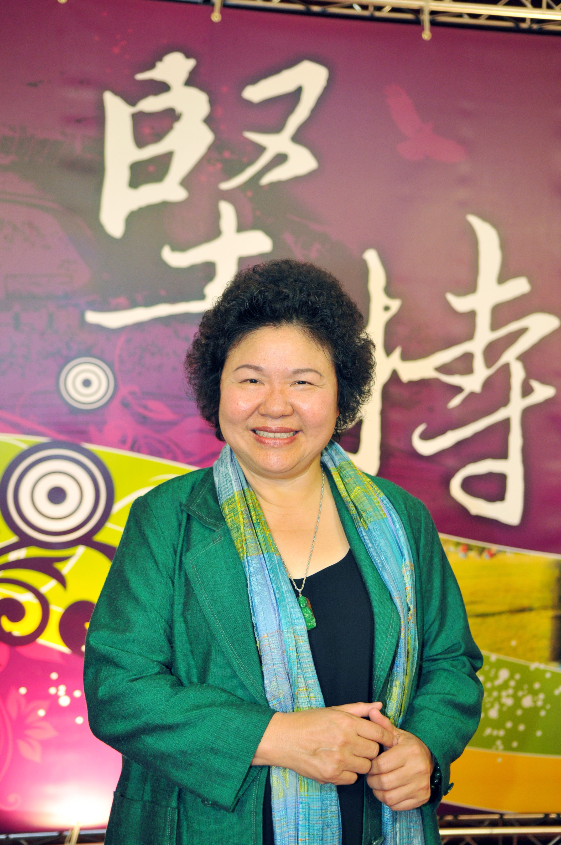 陳菊市長就職兩週年記者會拍攝；兩週年就職演講主題：「堅持 做對的事！」